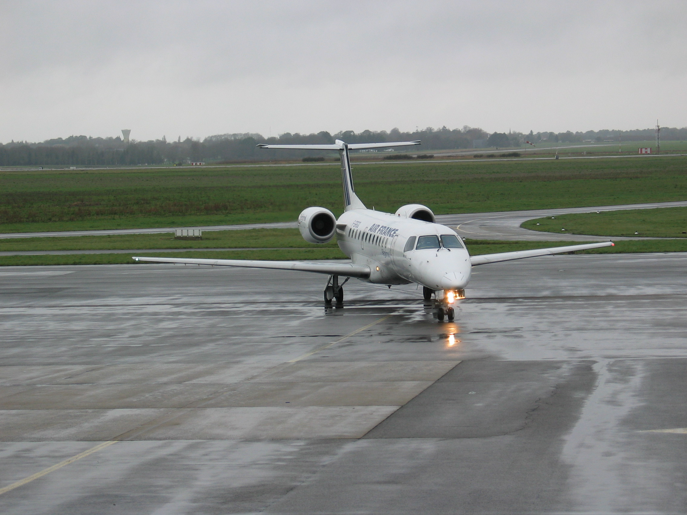 Avion Embraer ERJ-135 aéroport Lann Bihoué Ploemeur